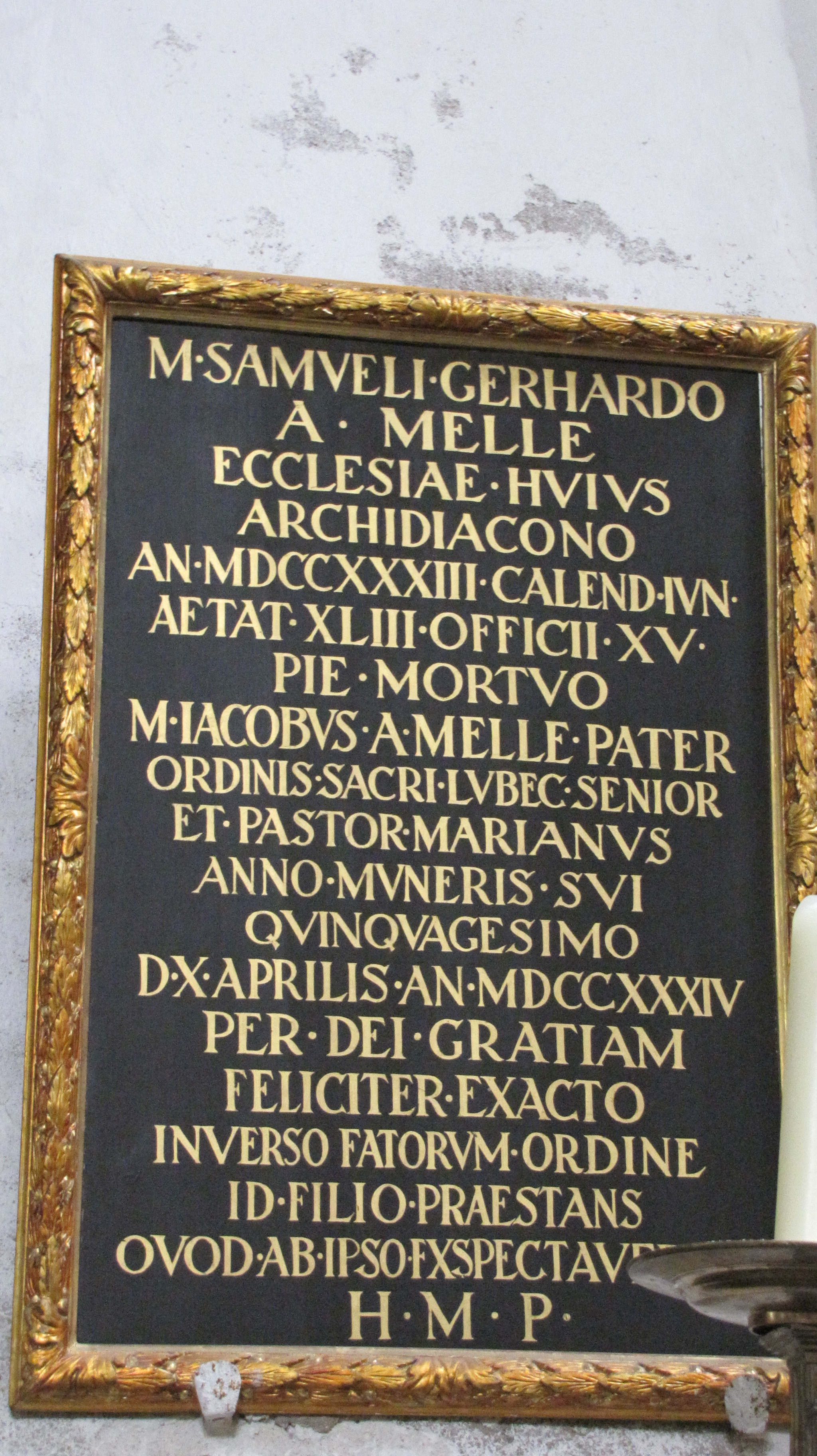 Epitaph for Pastor Samuel Gerhard von Melle (1690-1733) in St. Aegidien, Lübeck, set by his father Jacob von Melle